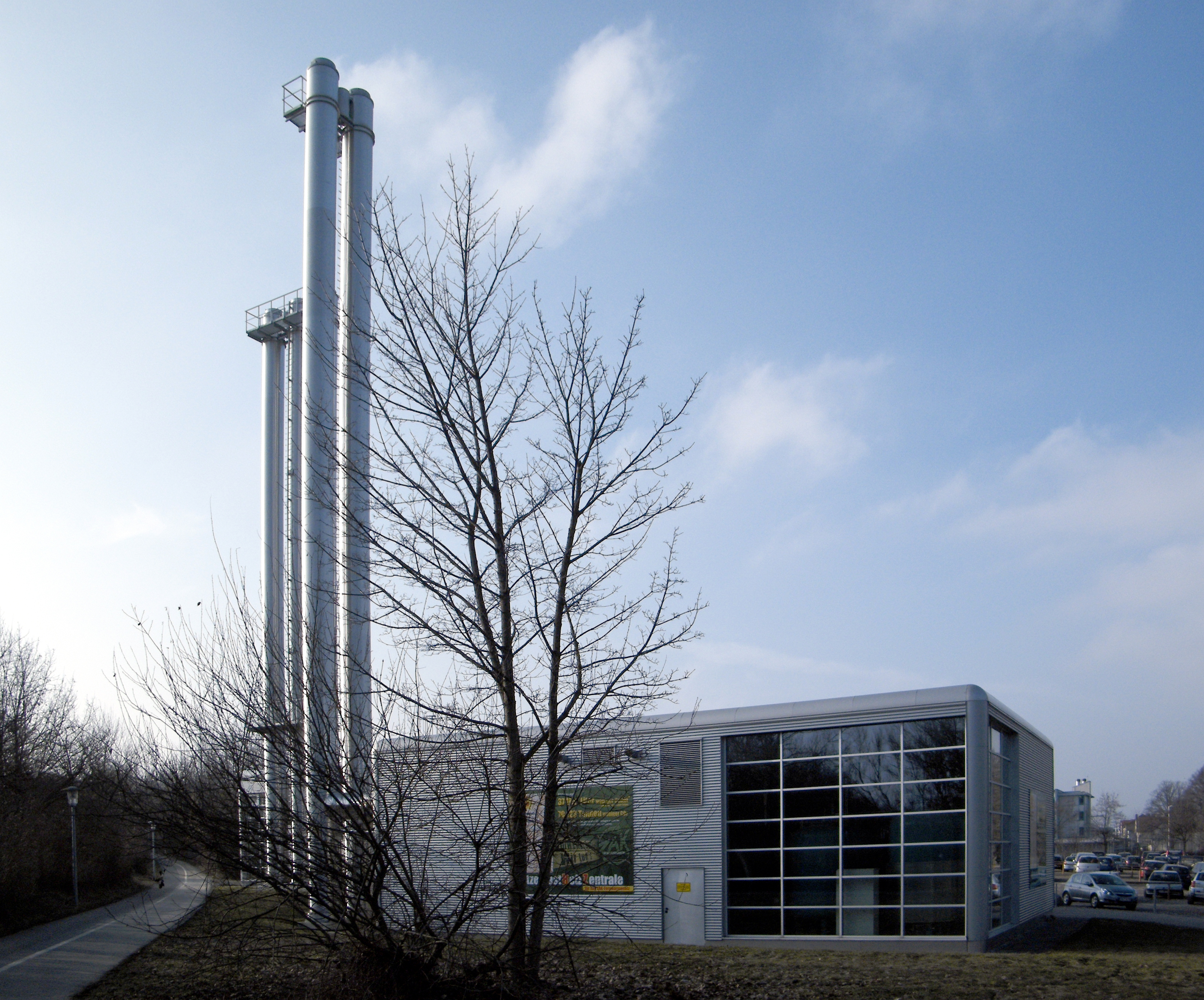 Blockheizwerk in Kempten. Offiziell als Spitzenlast-Heizzentrale bezeichnet. Teil des Fernwärmenetzes der Heizkraftwerke Kempten.